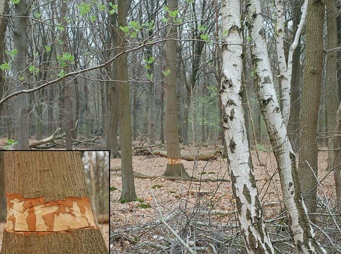 Om een natuurlijker bos te creëren wil men er geen uitheemse boomsoorten en een meer staand dood hout (Liggend dood hout is er al). De boom centraal op de foto is een Amerikaanse eik (Quercus rubra), door deze te ringen probeert men deze 2 doelstellingen te verwezenlijken. Verder zien we ruwe berken (Betula pendula), op de voorgrond, met witte schors, zomereiken (Quercus robur), verspreid met een ruwe schors, beuken (Fagus sylvatica), verspreid met een grijzige schors en lijsterbes (Sorbus aucuparia), op de voorgrond met jong blad. Ook kunnen we, door de strooisellaag en de weinige ondergroei, zien dat dit bos gedomineerd word door beuken en tot recent ook Amerikaanse eik. Door het kappen en ringen van Amerikaanse eiken kan er licht in het bos komen, waardoor er zich nieuwe bomen en struiken kunnen vestigen. Zou men dit bos niet beheren dan zullen er op termijn enkel beuken meer overblijven.